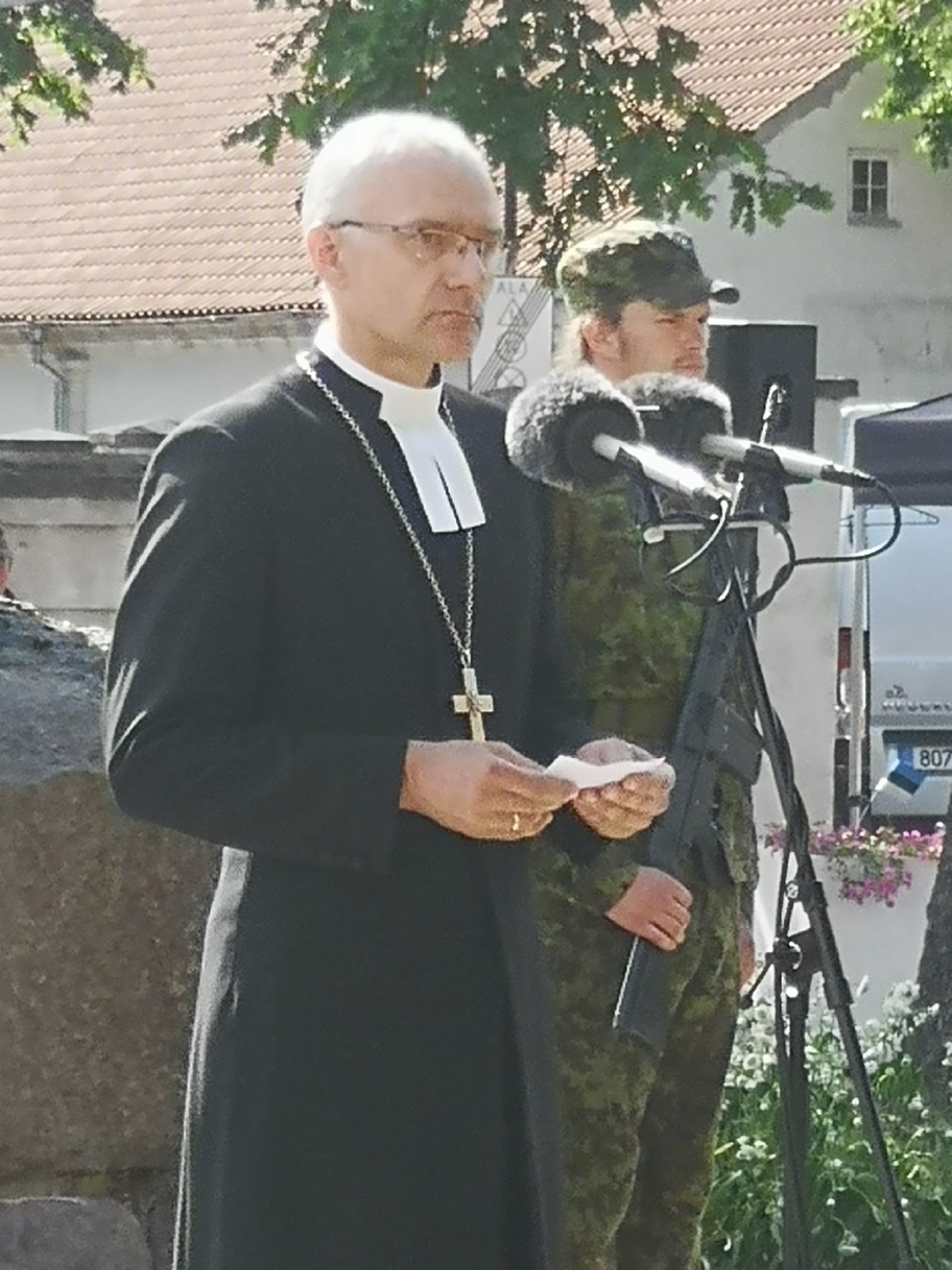 Anti Toplaan Kuressaares võidupüha tule jagamisel